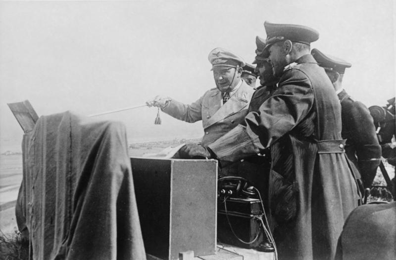 Der Reichsmarschall auf einem Gefechtsstand an der Kanalküste. 13.9.1940